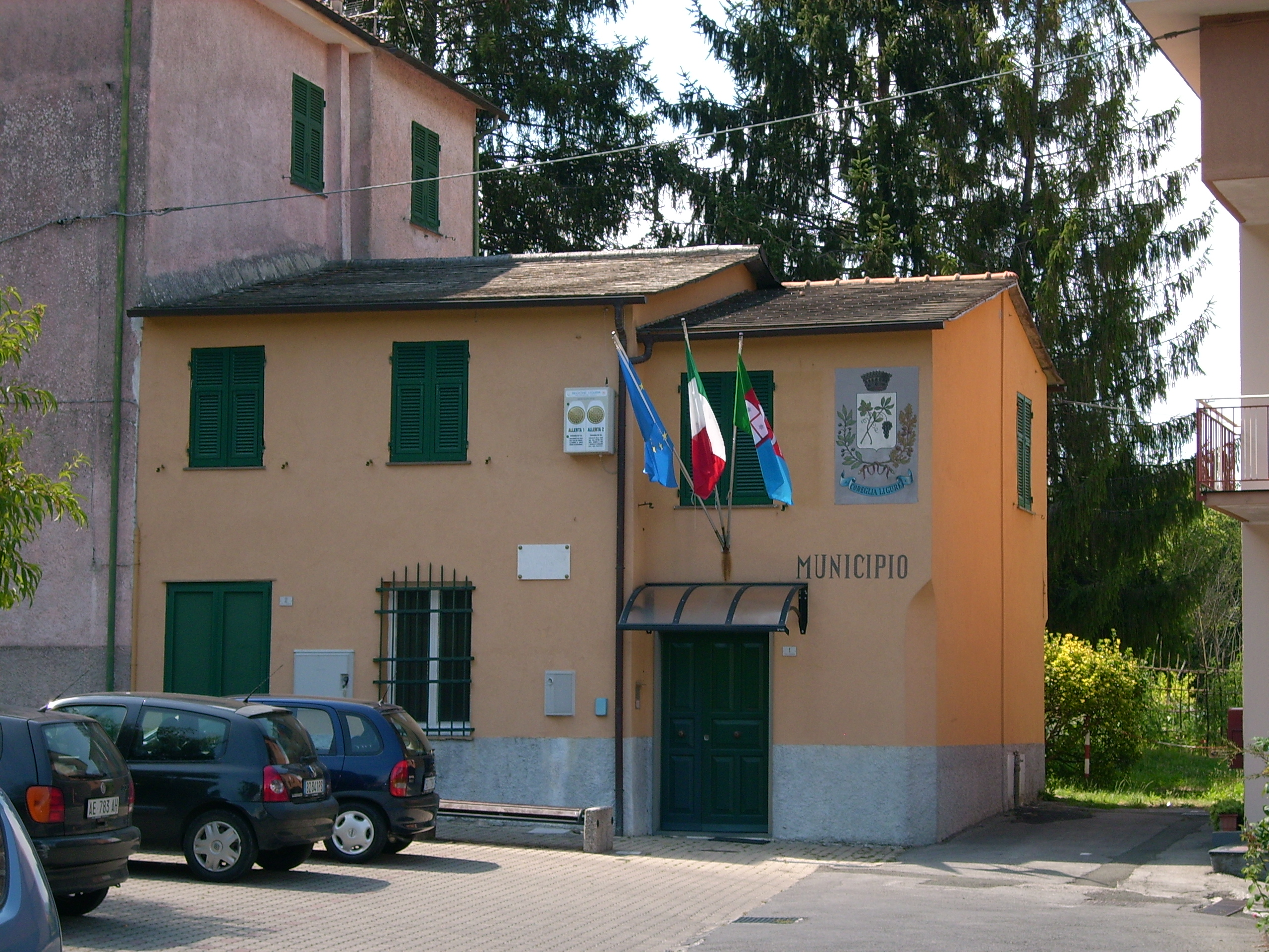 Municipio di Coreglia Ligure, Liguria, Italia